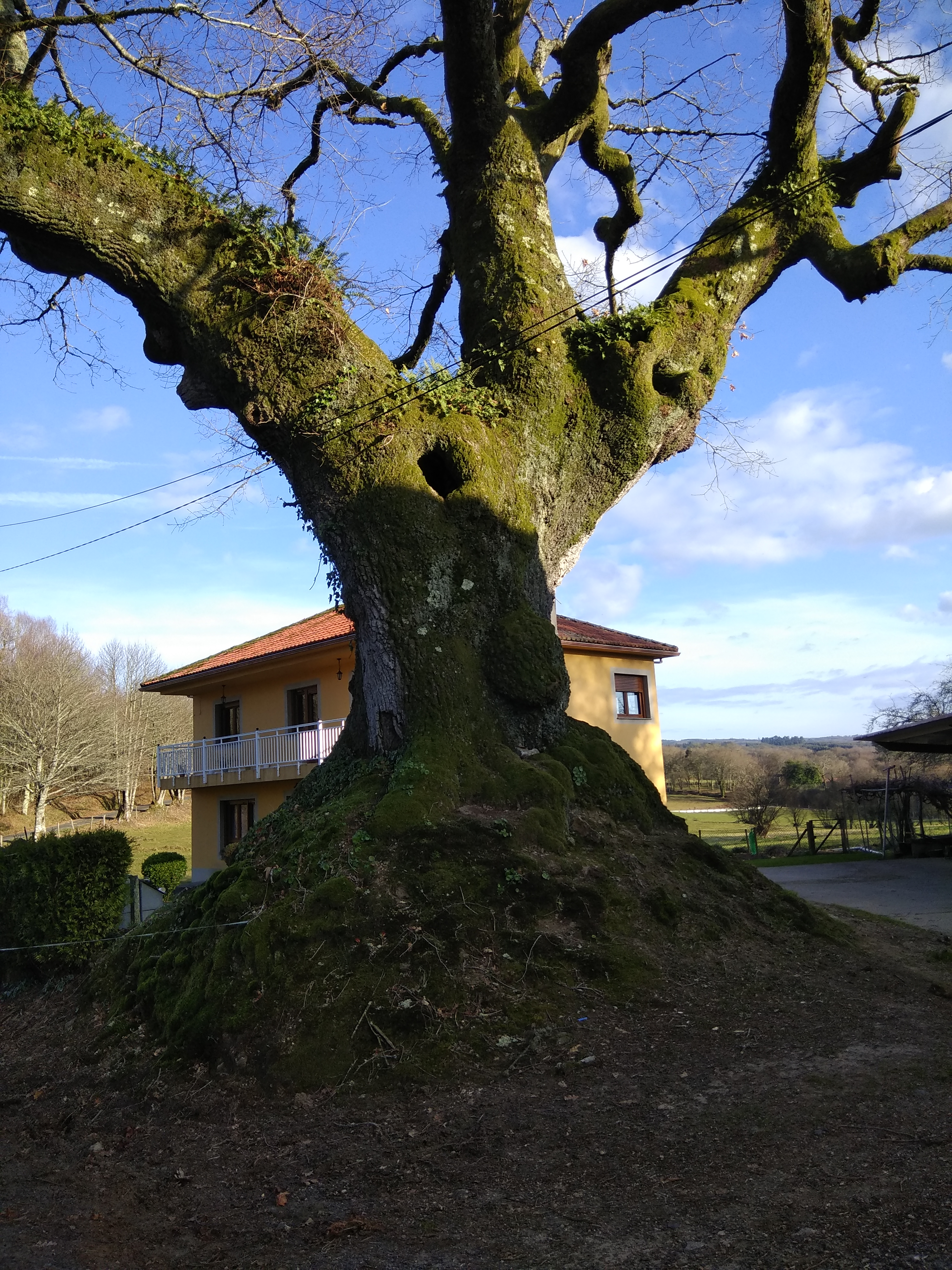 Carballo da Portacal (Cumbraos, Sobrado, Galiza).